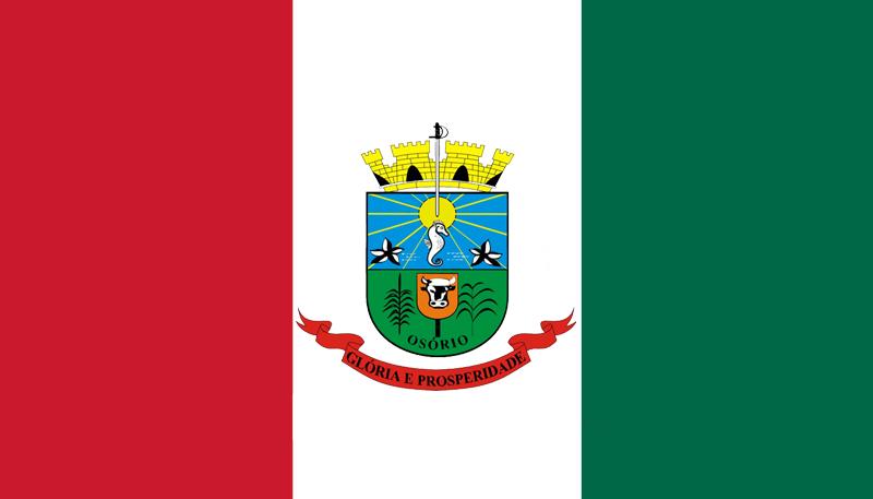 Bandeira do Município de Osório. Rio Grande do Sul, Brasil